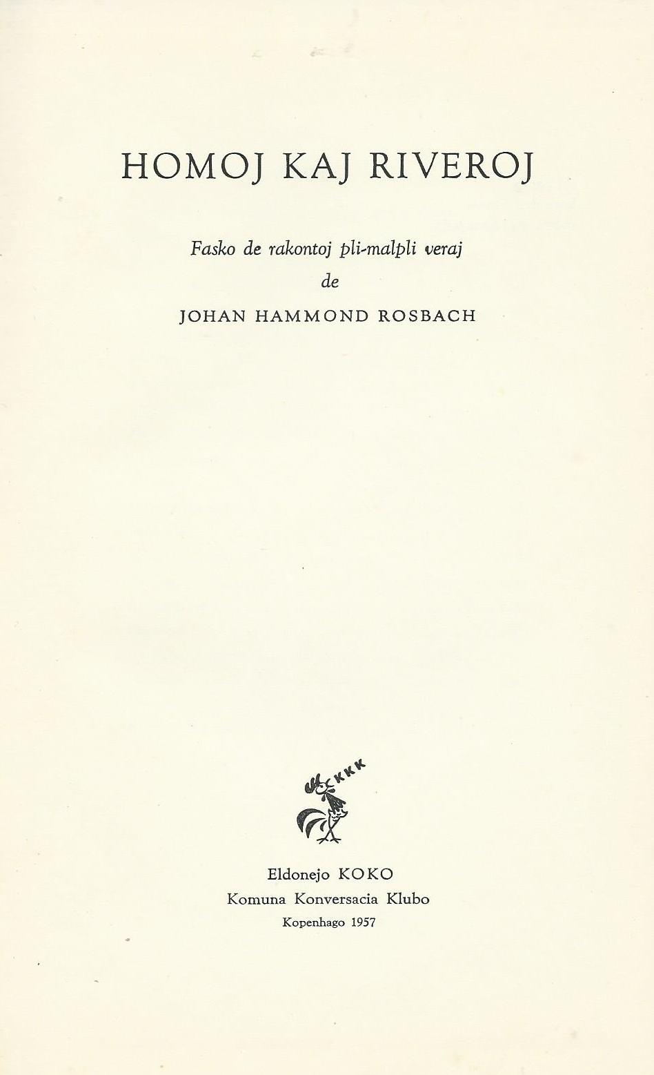 interna librokovrilo de "Homoj kaj Riveroj", 1957